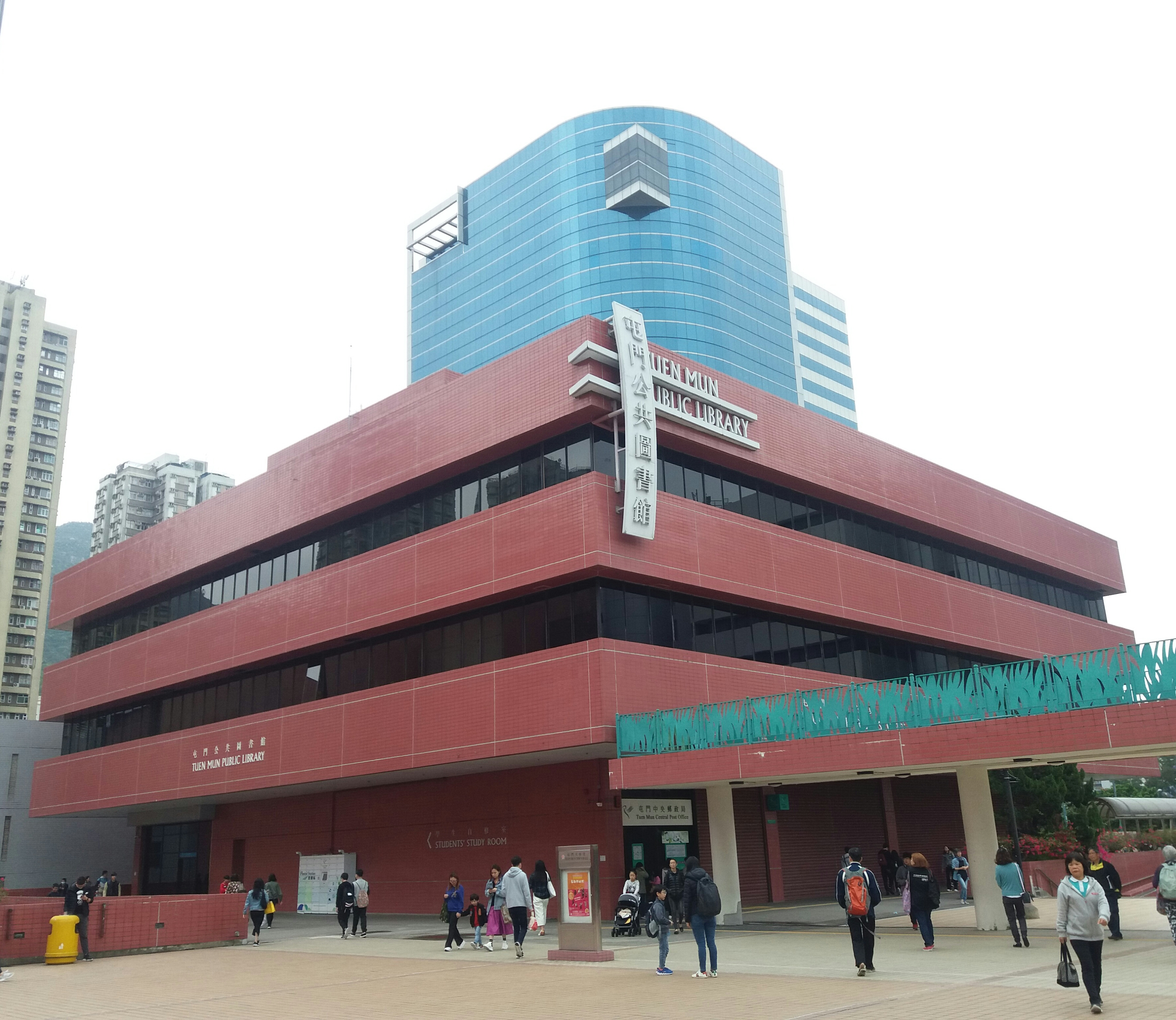 中文（香港）: 屯門公共圖書館的外型